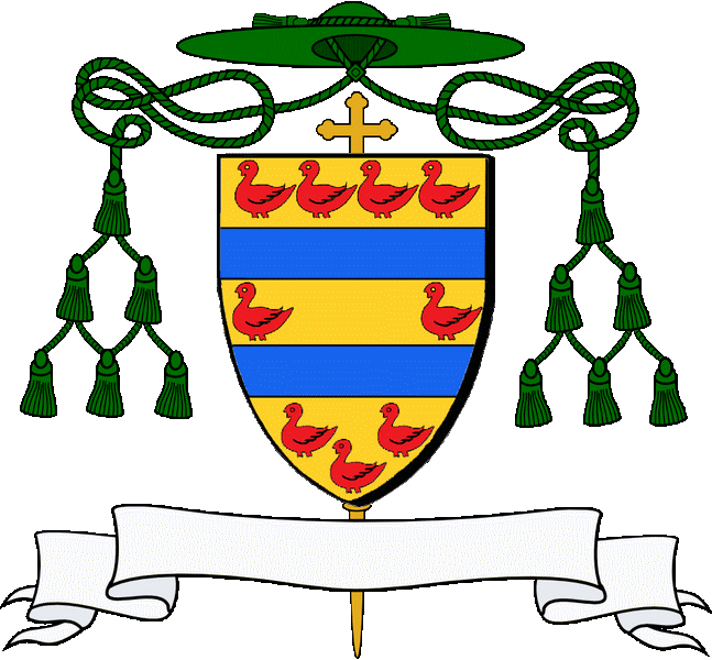 En aour e ziv dreustell en glazur, heuliet gant nav moualc'henn en gwad ouzh c'houremm